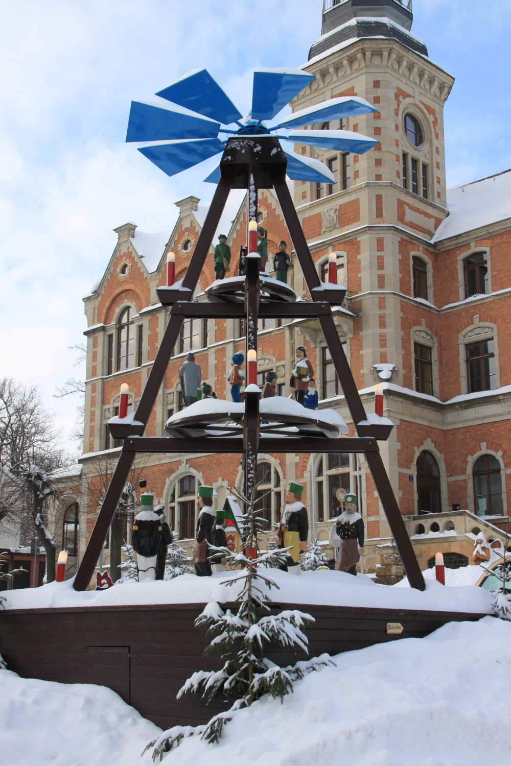 Ortspyramide in Stollberg